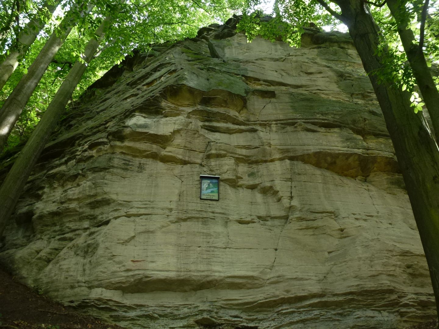 Bräutigamswand am Saalleitenweg zwischen Rückersdorf und Zeutsch